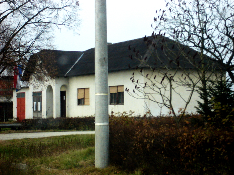 Dulepska - Dom